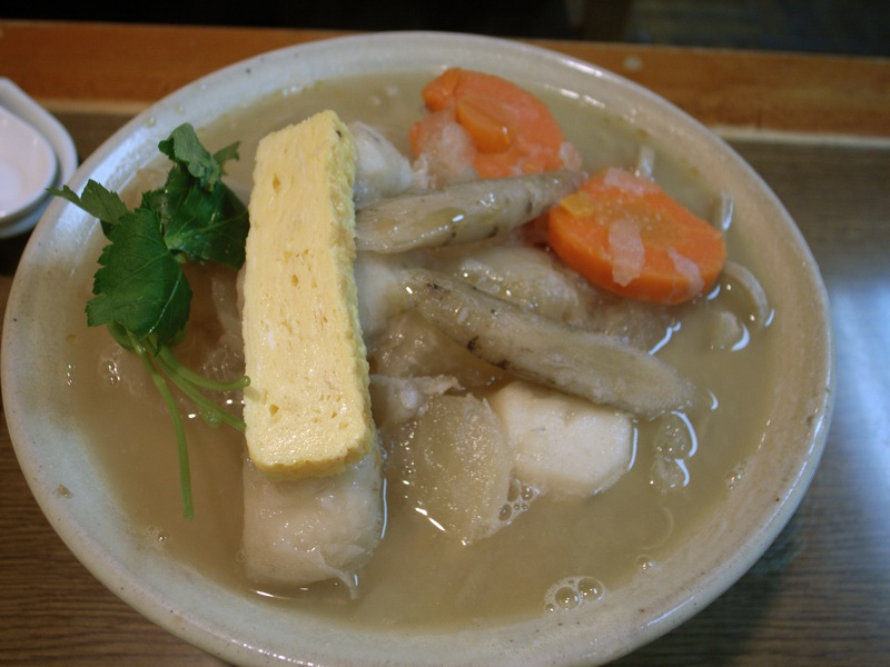 同じく、関内の志な乃のけんちん蕎麦。ほくほくの里芋や大根が大胆にゴロゴロと入ってる脅威のボリューム。これまたおいしかった。